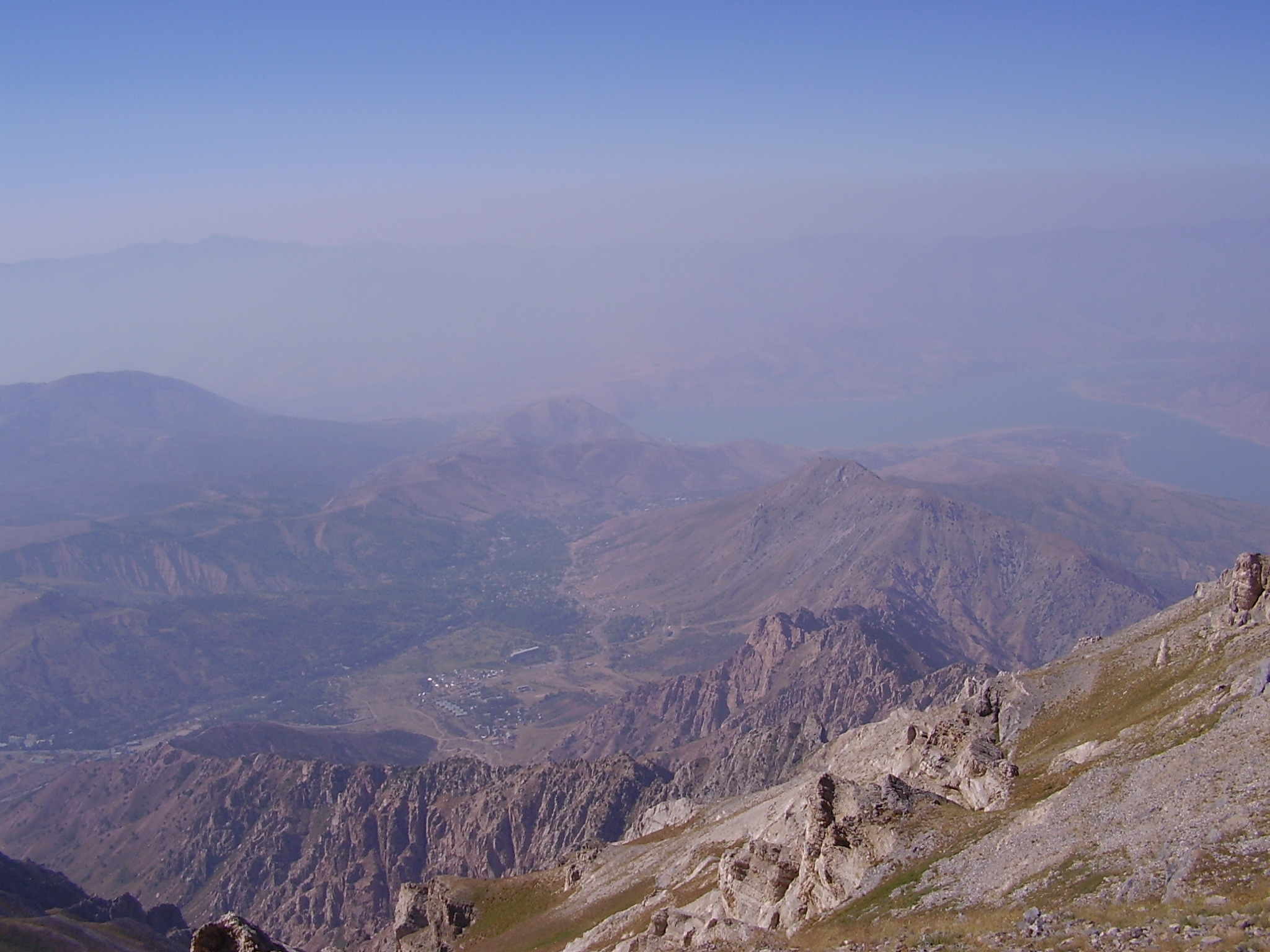 Вид Чарвакского водохранилища с вершины Большого чимгана